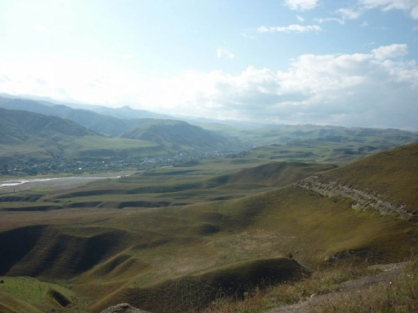 Окрестности села Верхний Куркужин